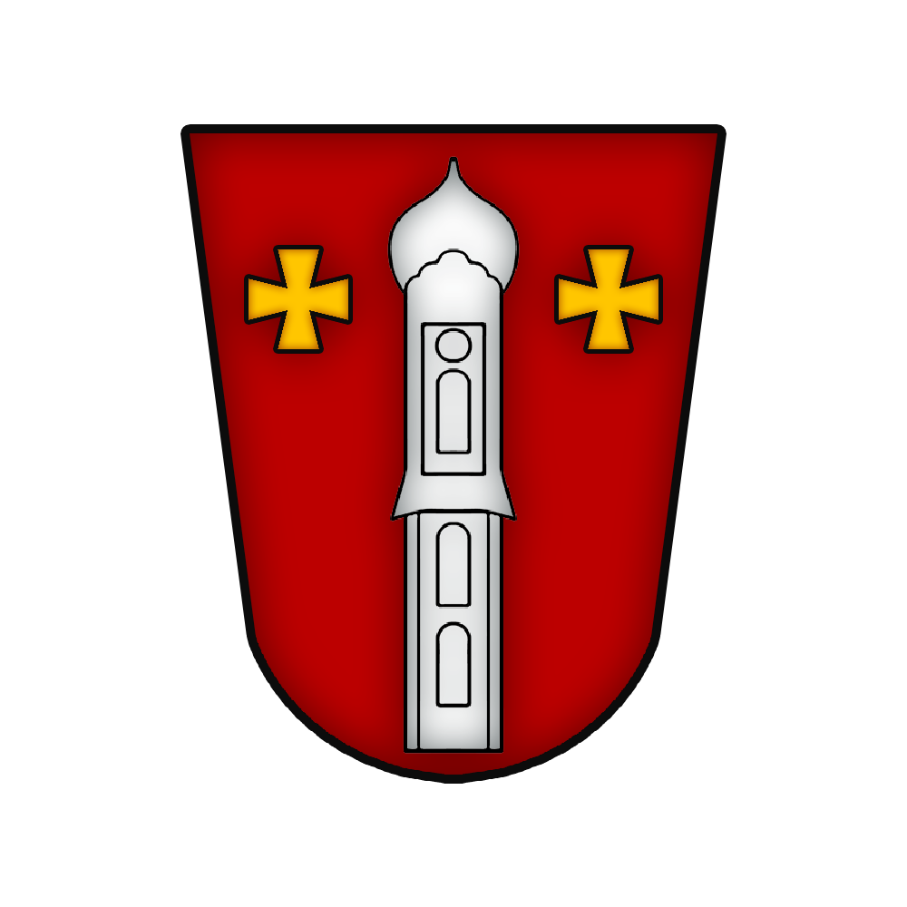 Ortswappen Herbertshofen (Meitingen) (überarbeitet/erneuert)